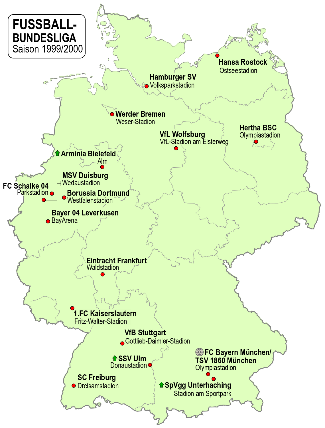 Karte der Vereine der Fussball-Bundesliga-Saison 1999/2000